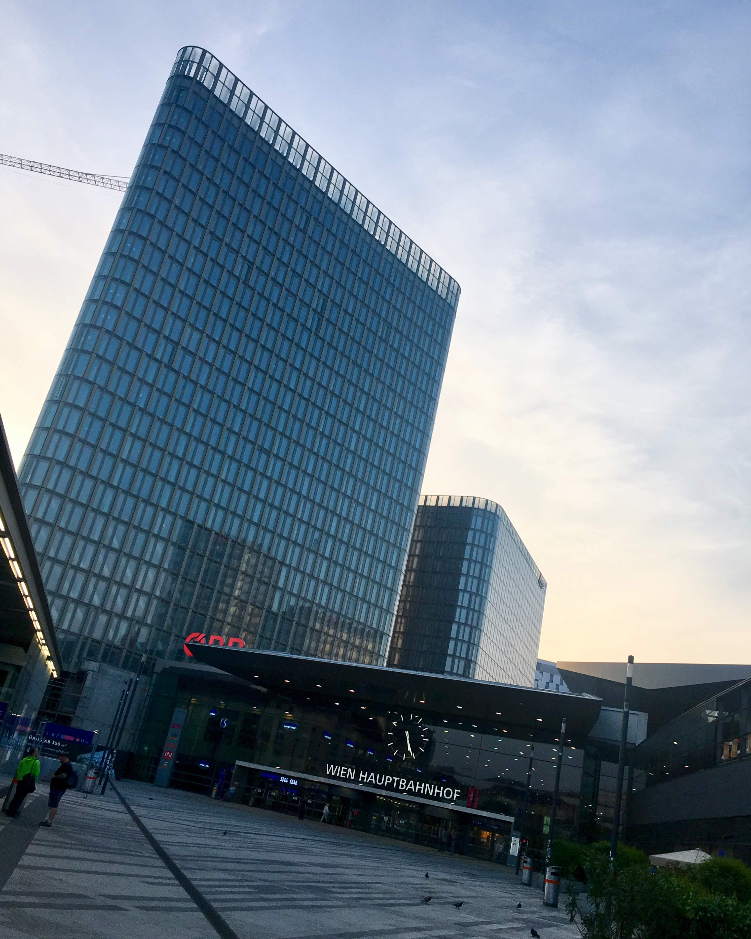 Nowoczesna przestrzeń Wiednia głównego